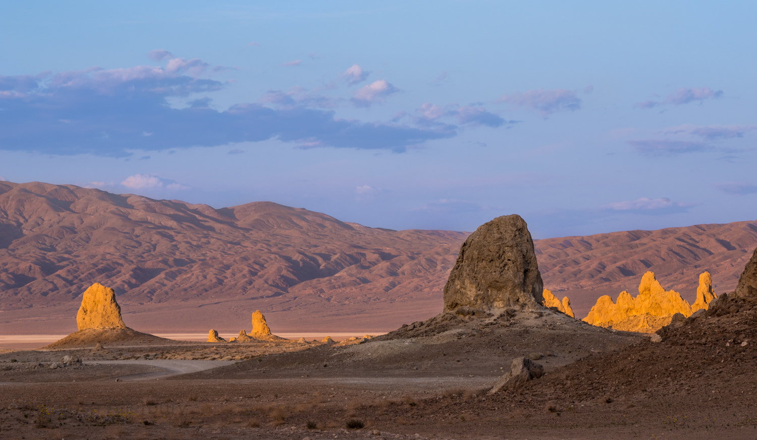 500px provided description: Sunset, Trona Pinnacles [#sunset ,#california ,#desert ,#Mojave ,#Pinnacles]